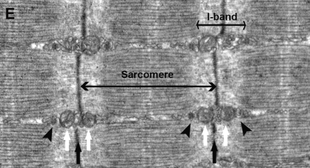 Figura 6. Microscopía electrónica de fibras de músculo a diferentes longitudes de sarcómero. (E) Las puntas de flecha en las micrografías apuntan a las unidades liberadoras de calcio (CRU). Se marca la posición de las líneas Z en miofibrillas preparadas en su longitud de descanso (∼1,9 µm). Las flechas negras marcan la posición de los discos Z que delimitan el sarcómero (sarcomere). Las flechas blancas apuntan a las mitocondrias. Barra de escala: 0.5µm.